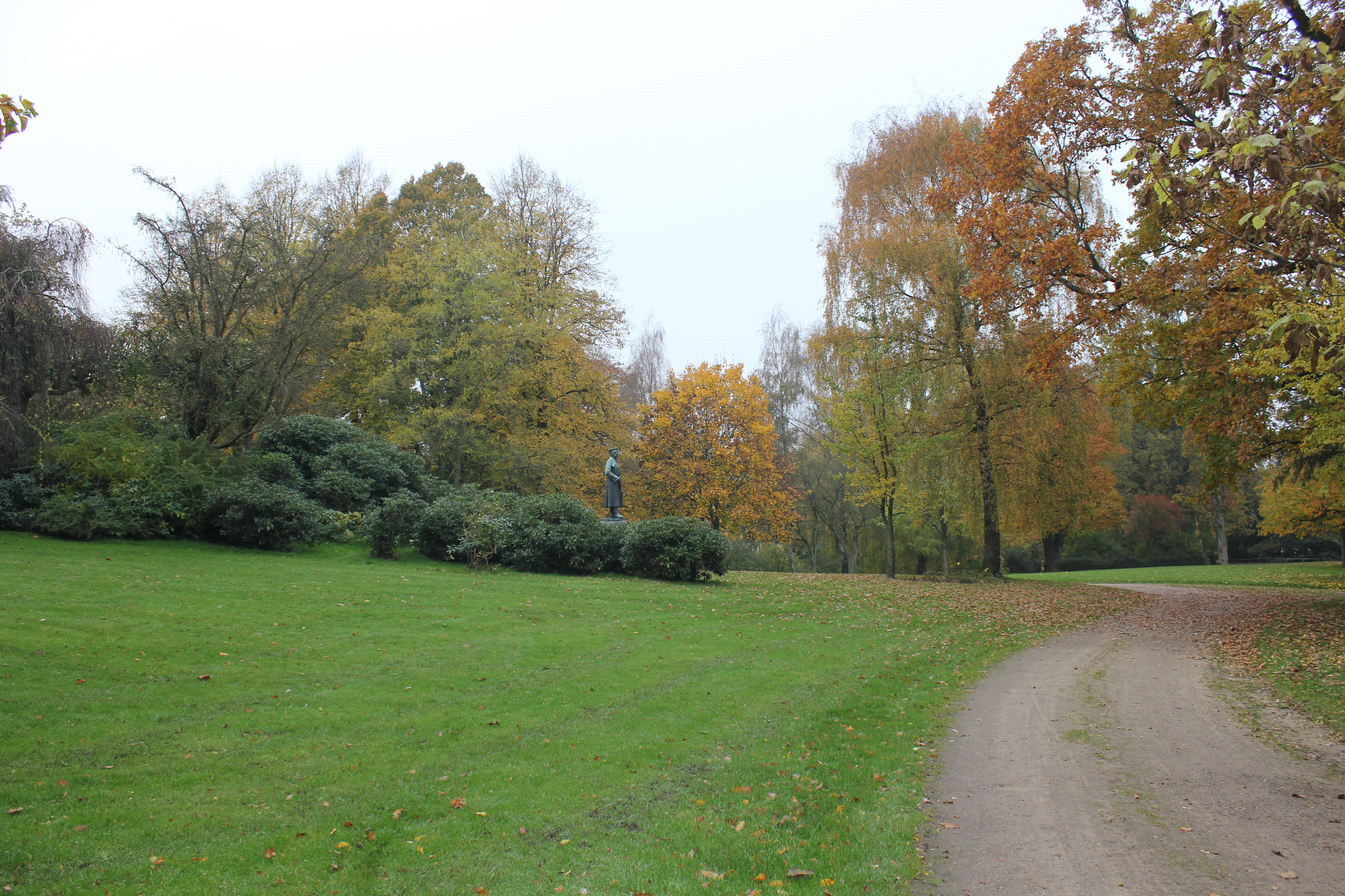 Weg zur beziehungsweise von der Wrangel-Statue, Stadtpark Flensburg